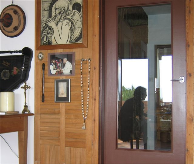 Bogdan Mizerski (b. 1955), Polish musician